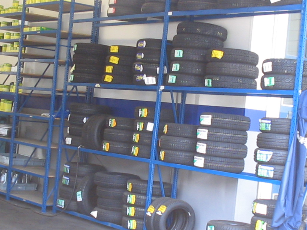 Stellage autobanden, kwikfit wibautstraat A'dam Categorie:Wikipedia:Afbeeldingen/Gebruiker:Michiel1972